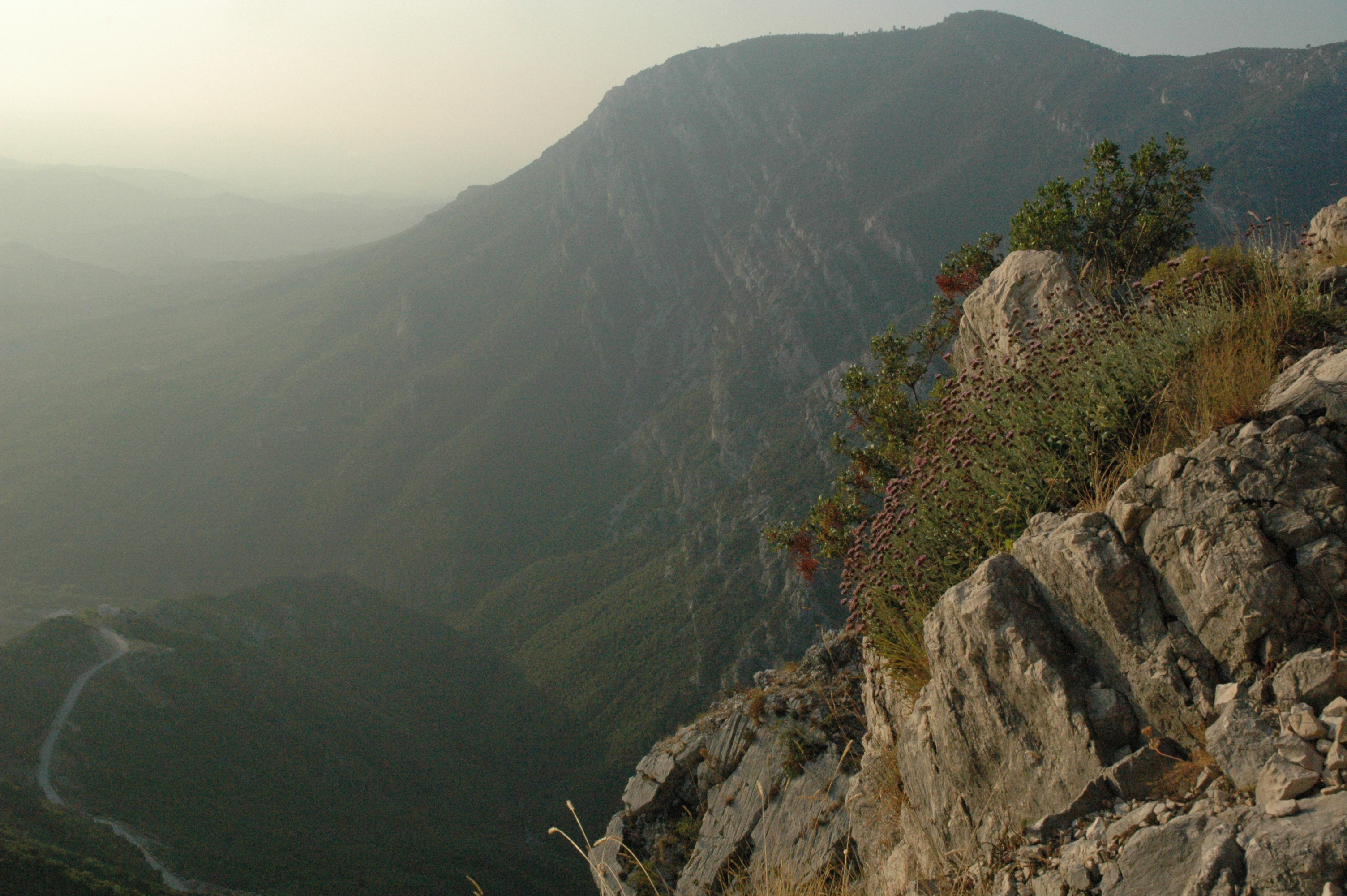 Mountains near Kruja, Albania